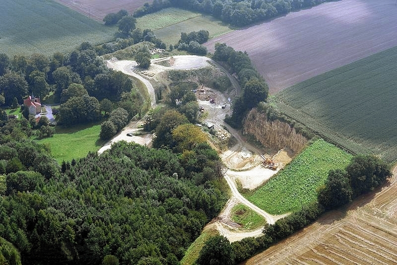 Luftbild Steinbruch Fark, Havixbeck